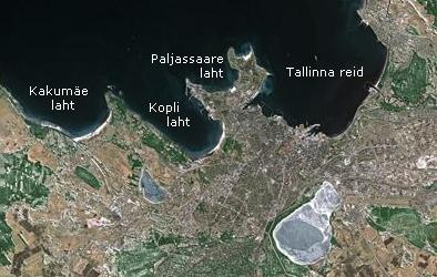 Tallinna lahe osad